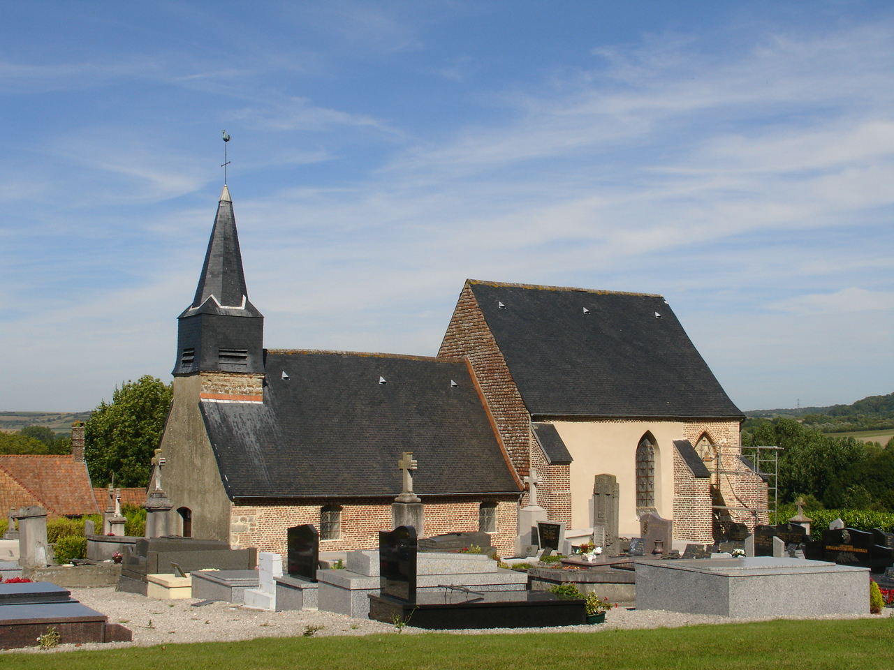 Église de Vieil-Moutier